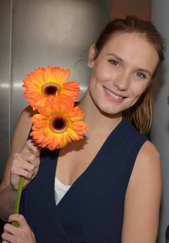 Ana Girardot à l'ouverture du Printemps du cinéma